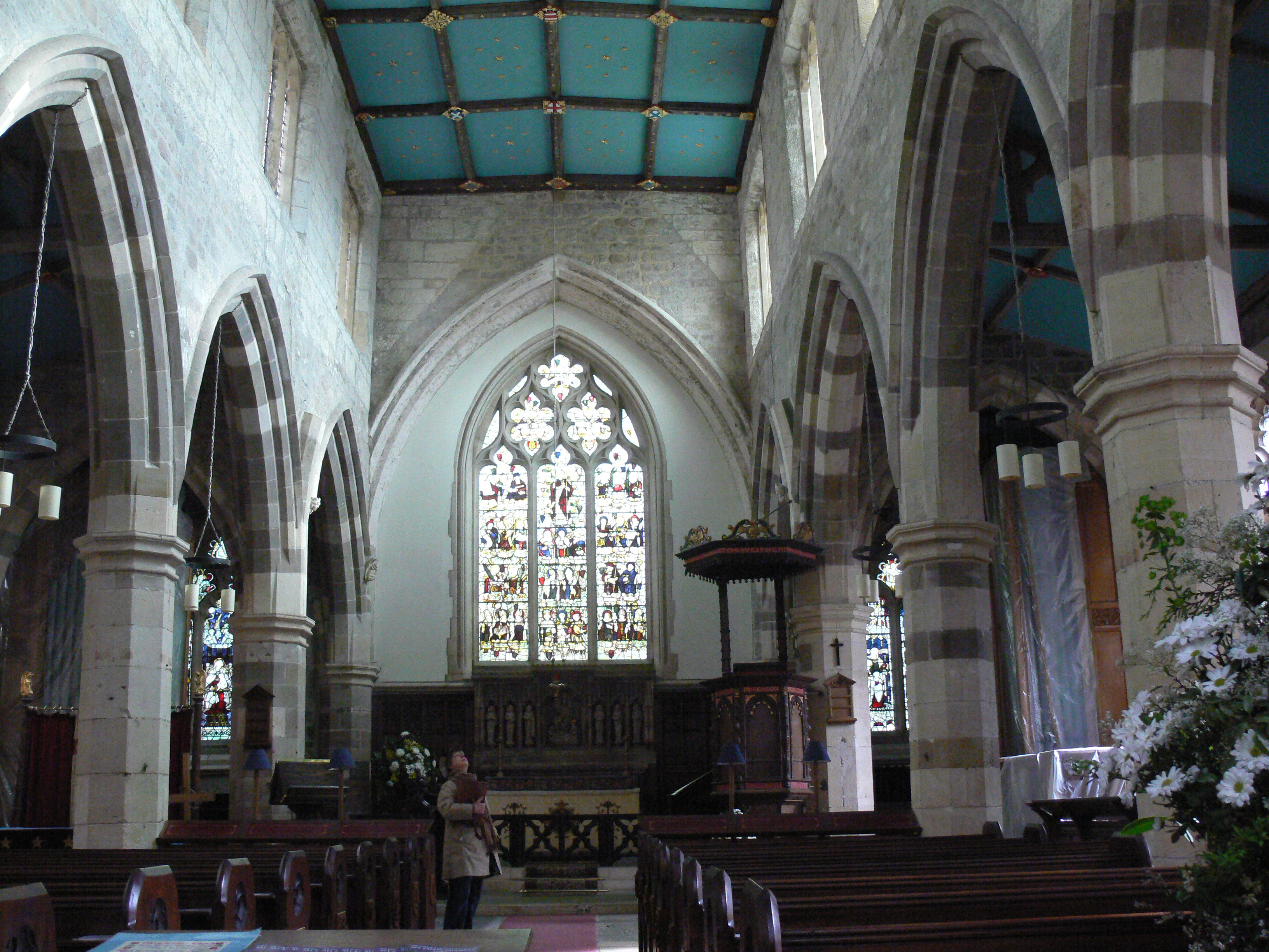 Innenraum der Kirche All Saints Pavement in York